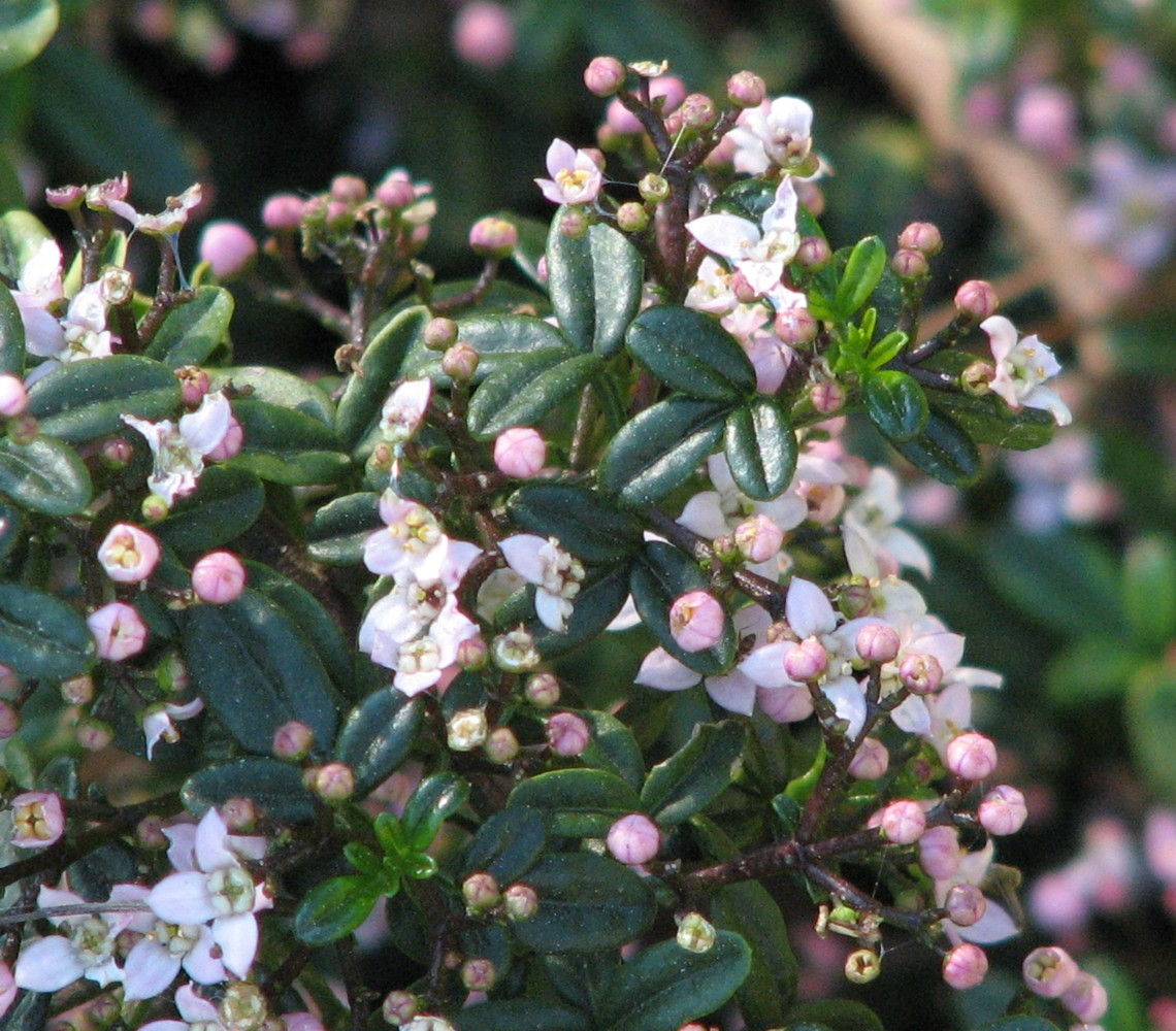 Zieria prostrata(labelled), Geelong Botanic Gardens, Victoria, Australia